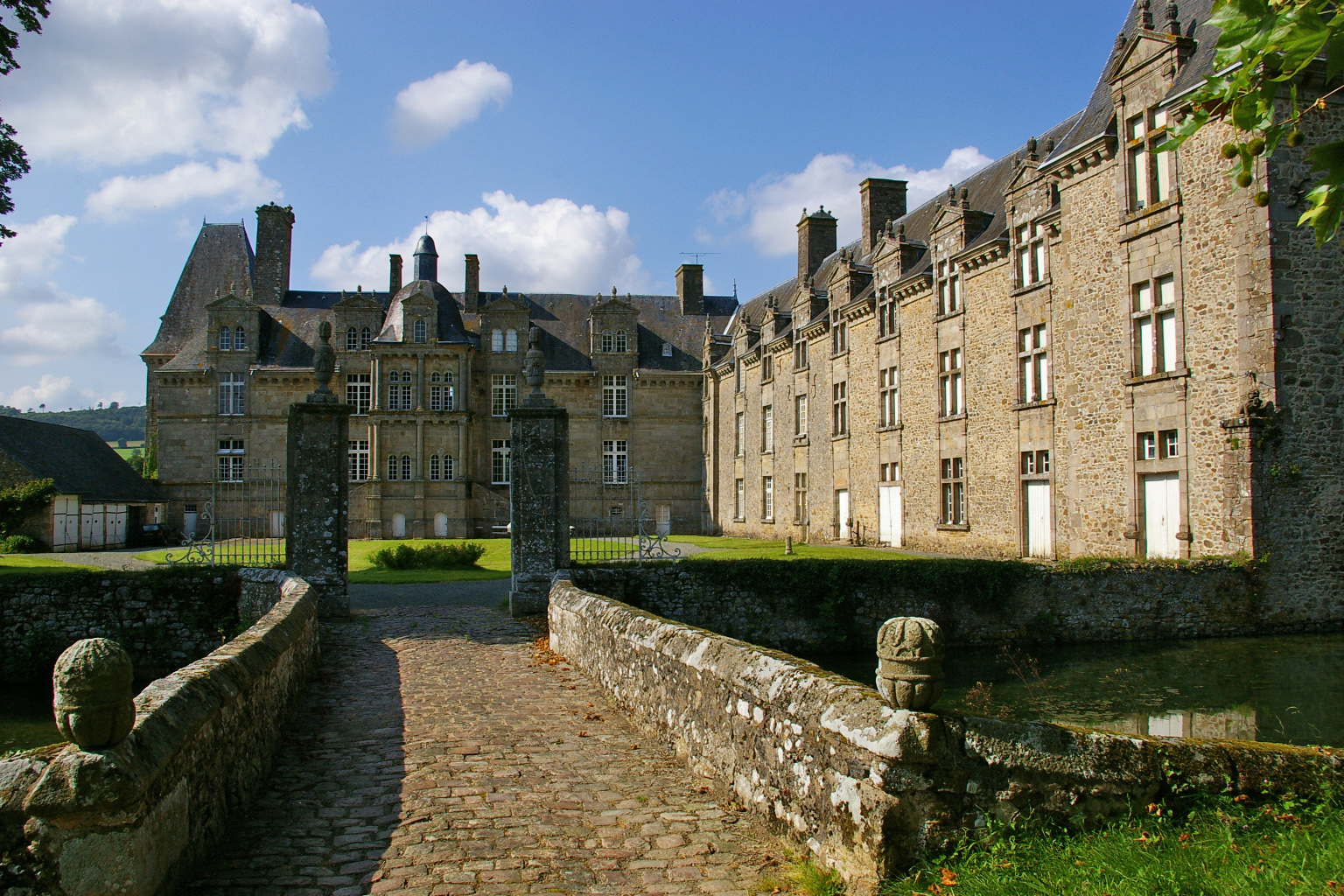 Château de Foulletorte Saint-Georges-sur-Erve (53)